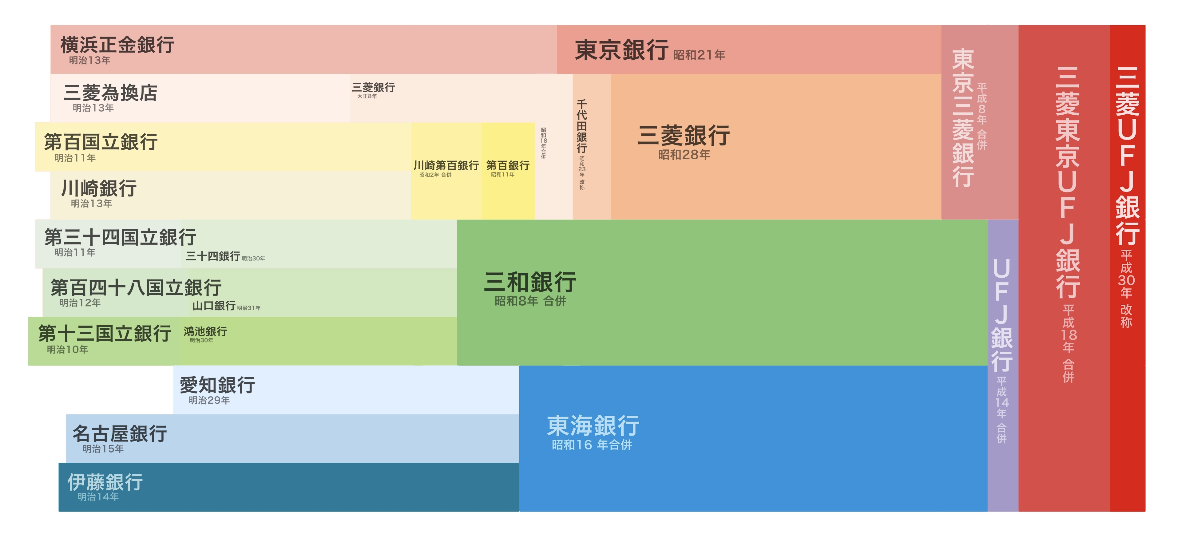 三菱UFJ銀行にいたるまでの銀行合併史の概要を図示。作成にあたって、三菱UFJ銀行「三菱ＵＦＪ銀行の沿革」（ ）を参照し、横軸の時間の縮尺は等しく改めた。